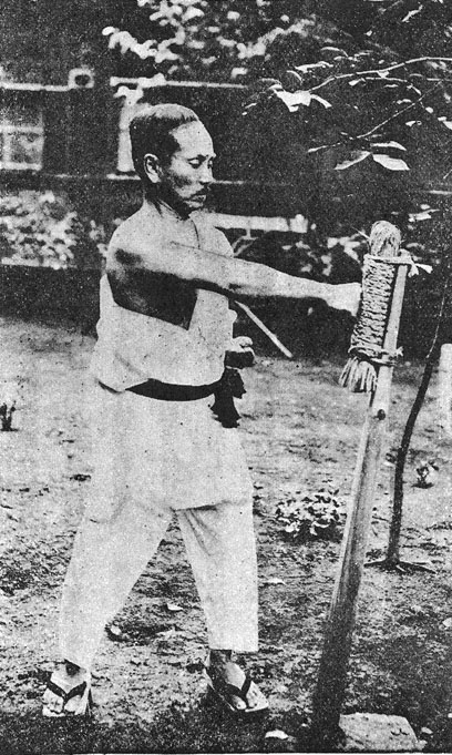 船越義珍の巻藁づき(Makiwara training of Funakoshi Gichin, 1868 - 1957)